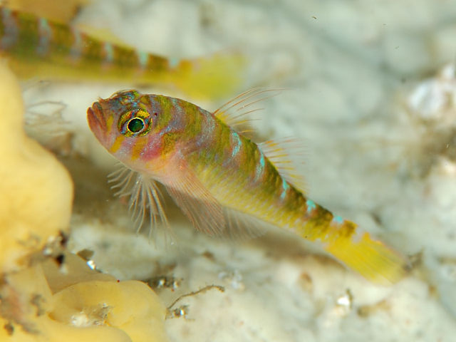 オニベニハゼ Trimma yanagitai